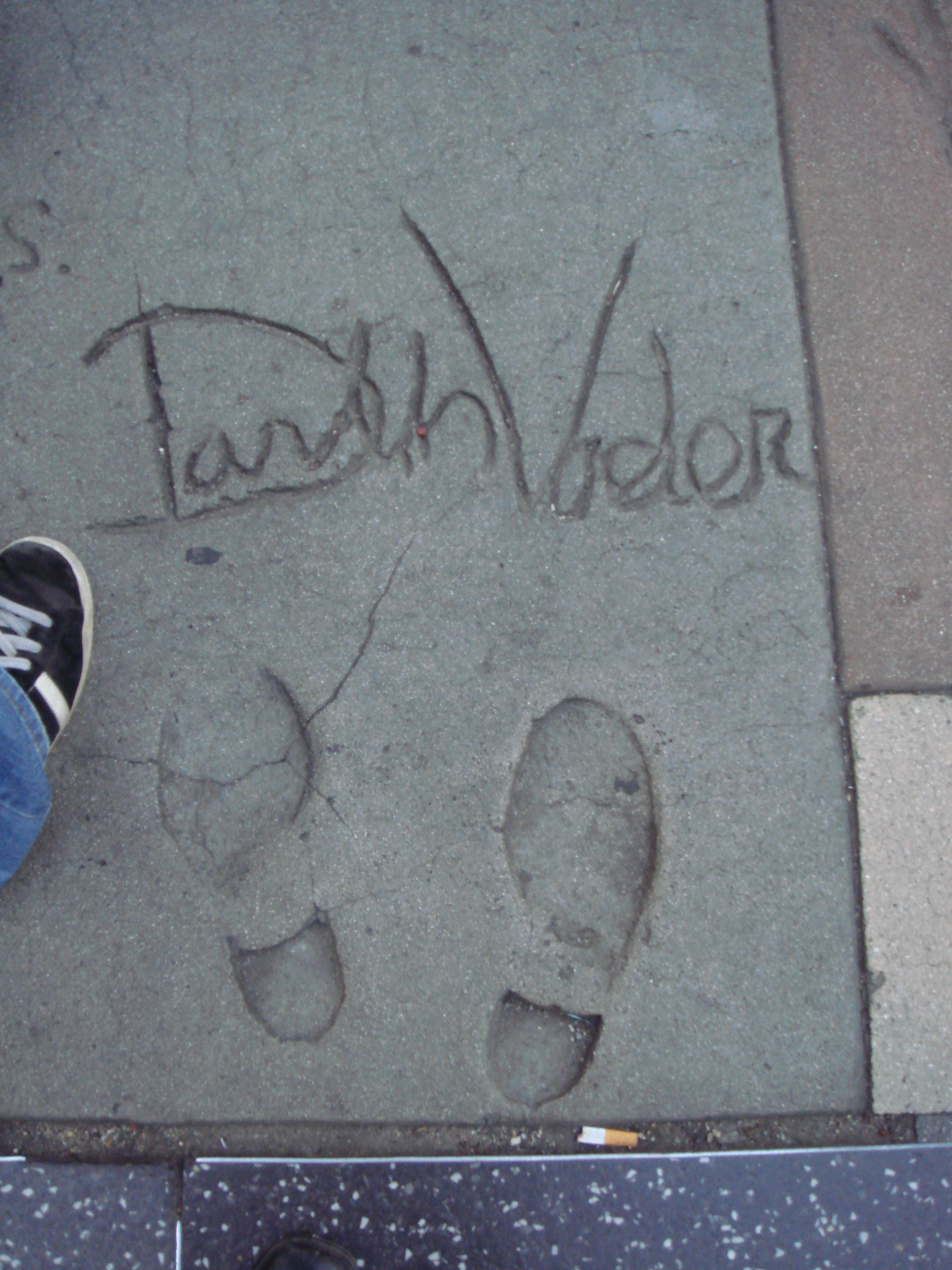 Darth Vader signature.